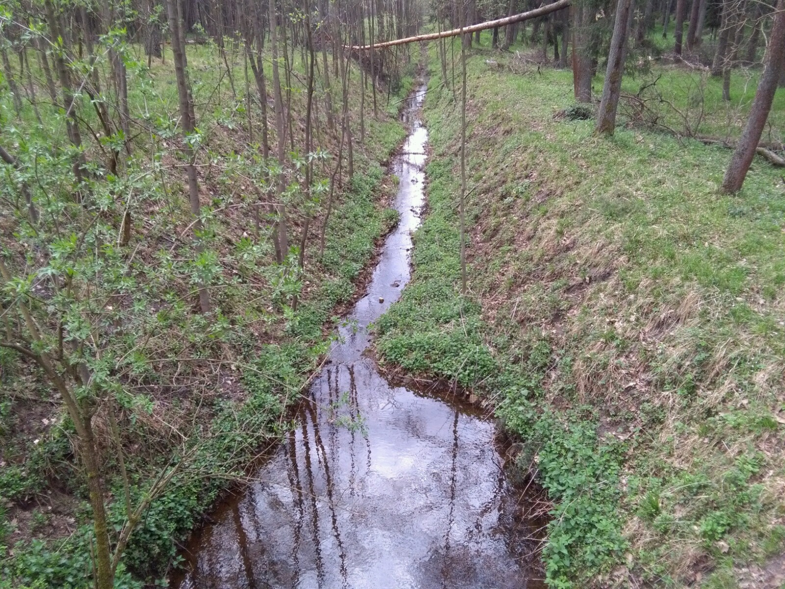 Rów Murckowski/Miodawa - przedostatni przepust w Lesie Murckowskim przed ujściem do Mlecznej.